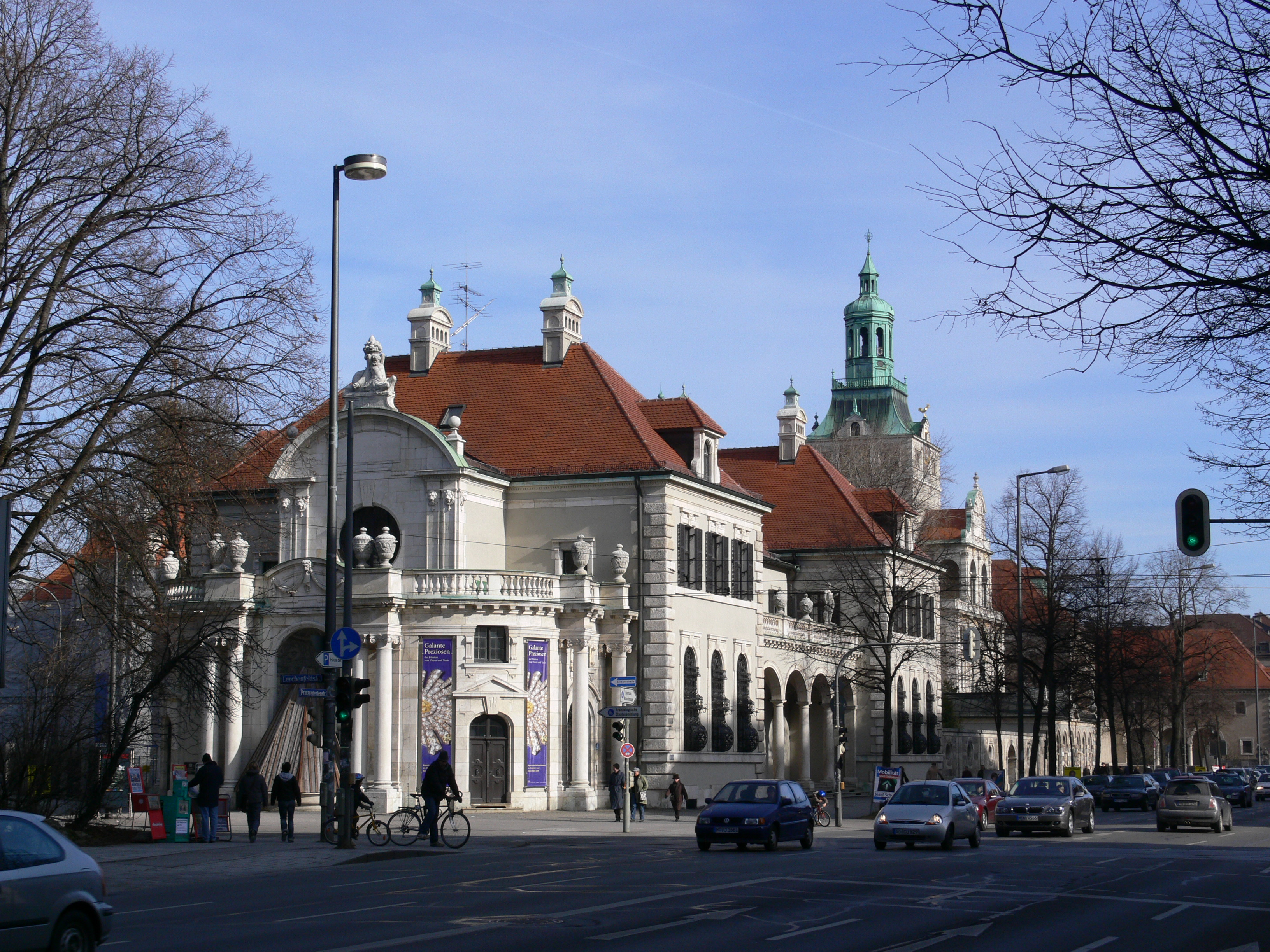 München, Bayerisches Nationalmuseum